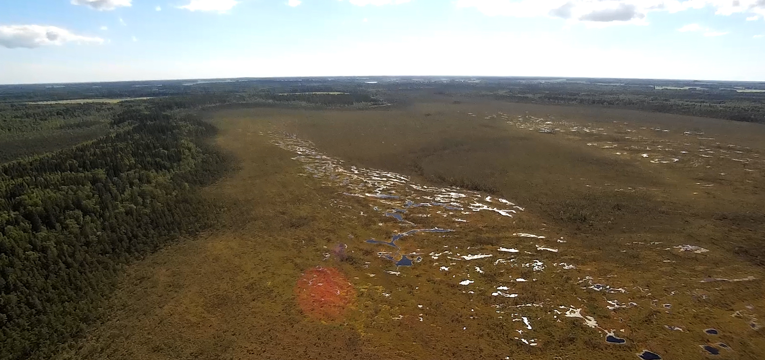 Aukštasis Tyras